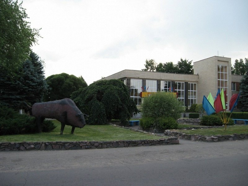 Пліса. Смалевіцкая бройлерная птушкафабрыка